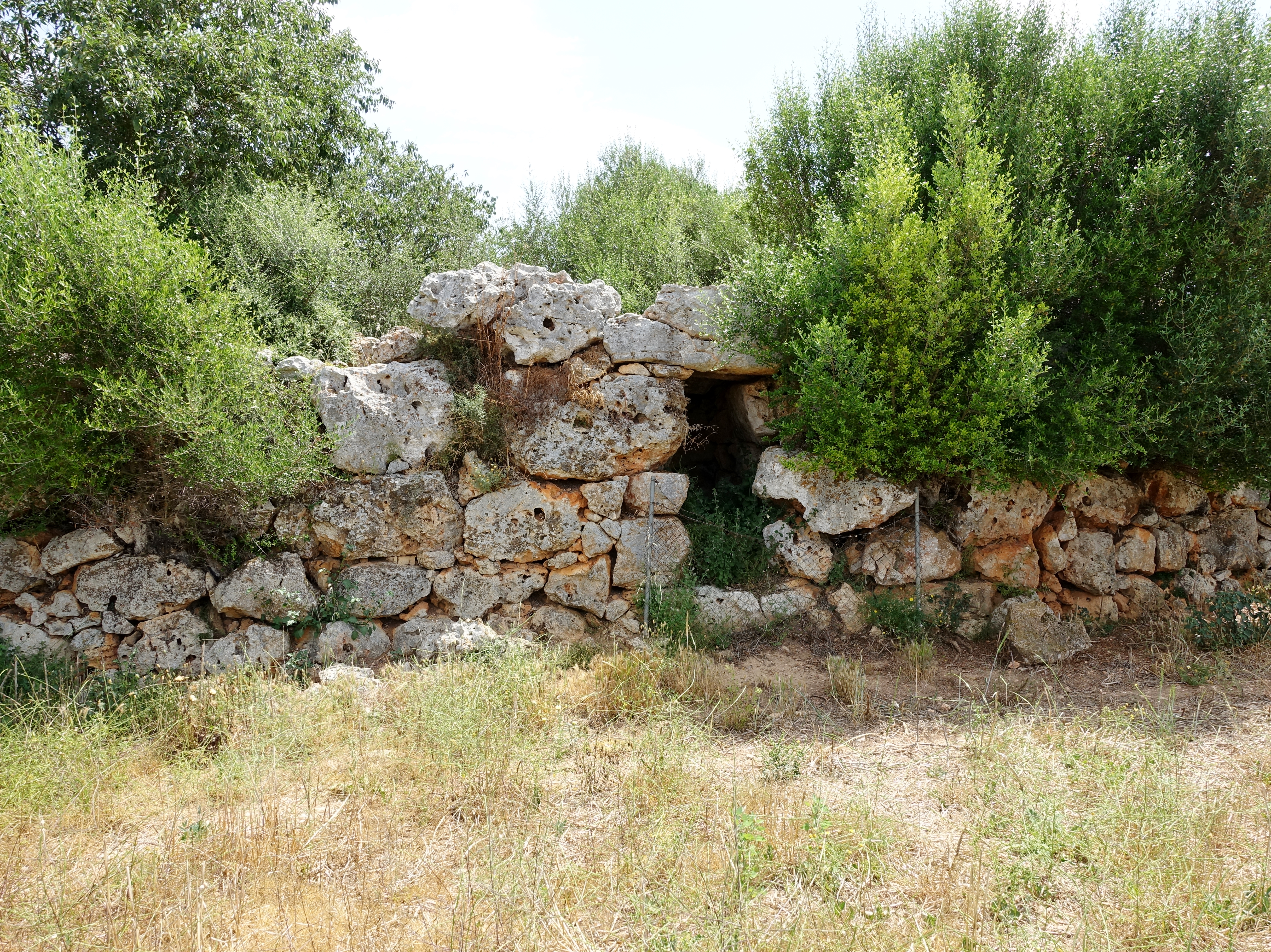 Nördlicher Talaiot der Talaies de Can Xim, Gemeinde Sencelles, Mallorca, Spanien